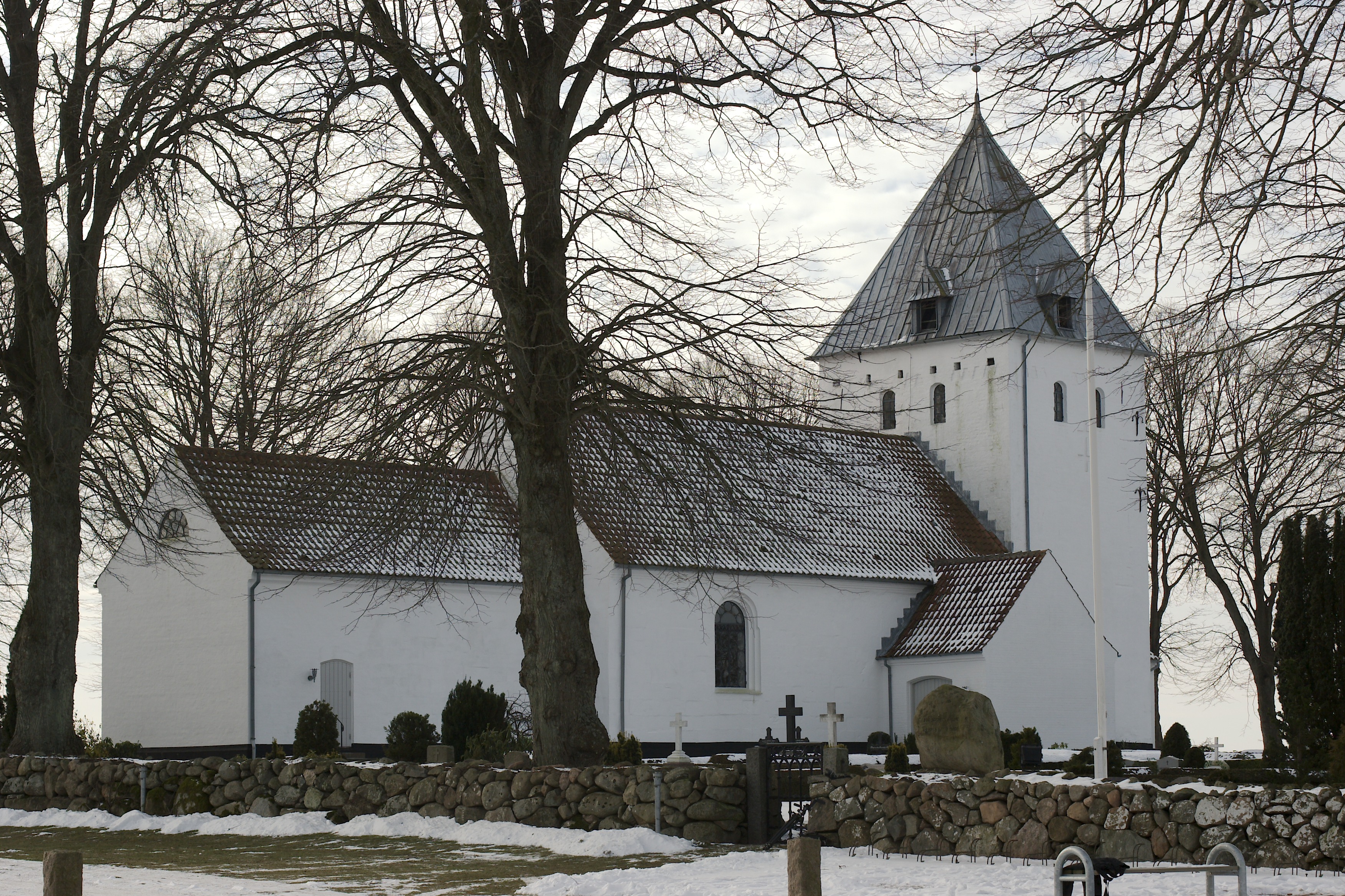 Moltrup Kirke